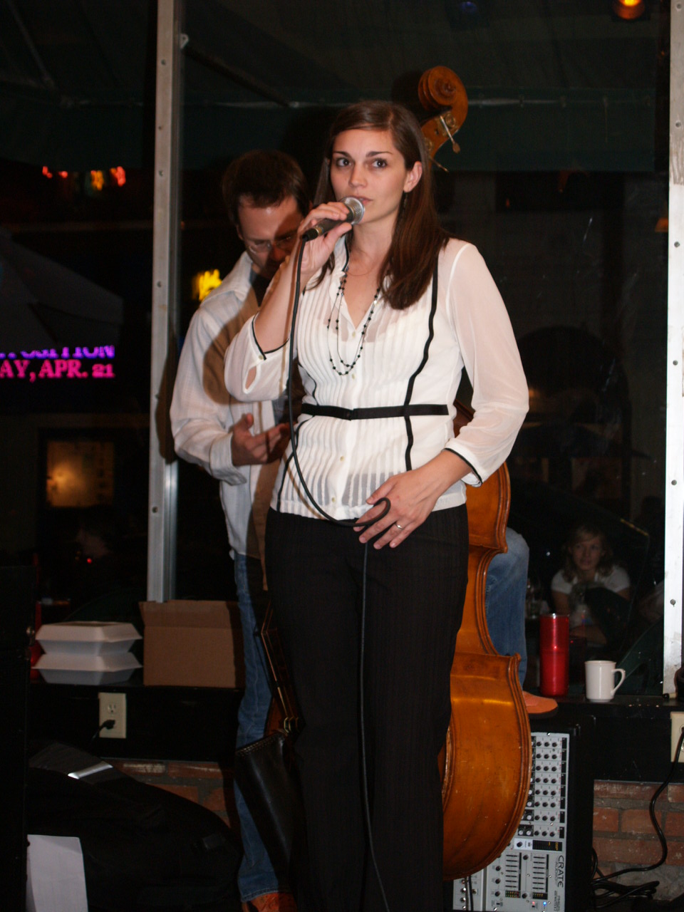 Erin Bode